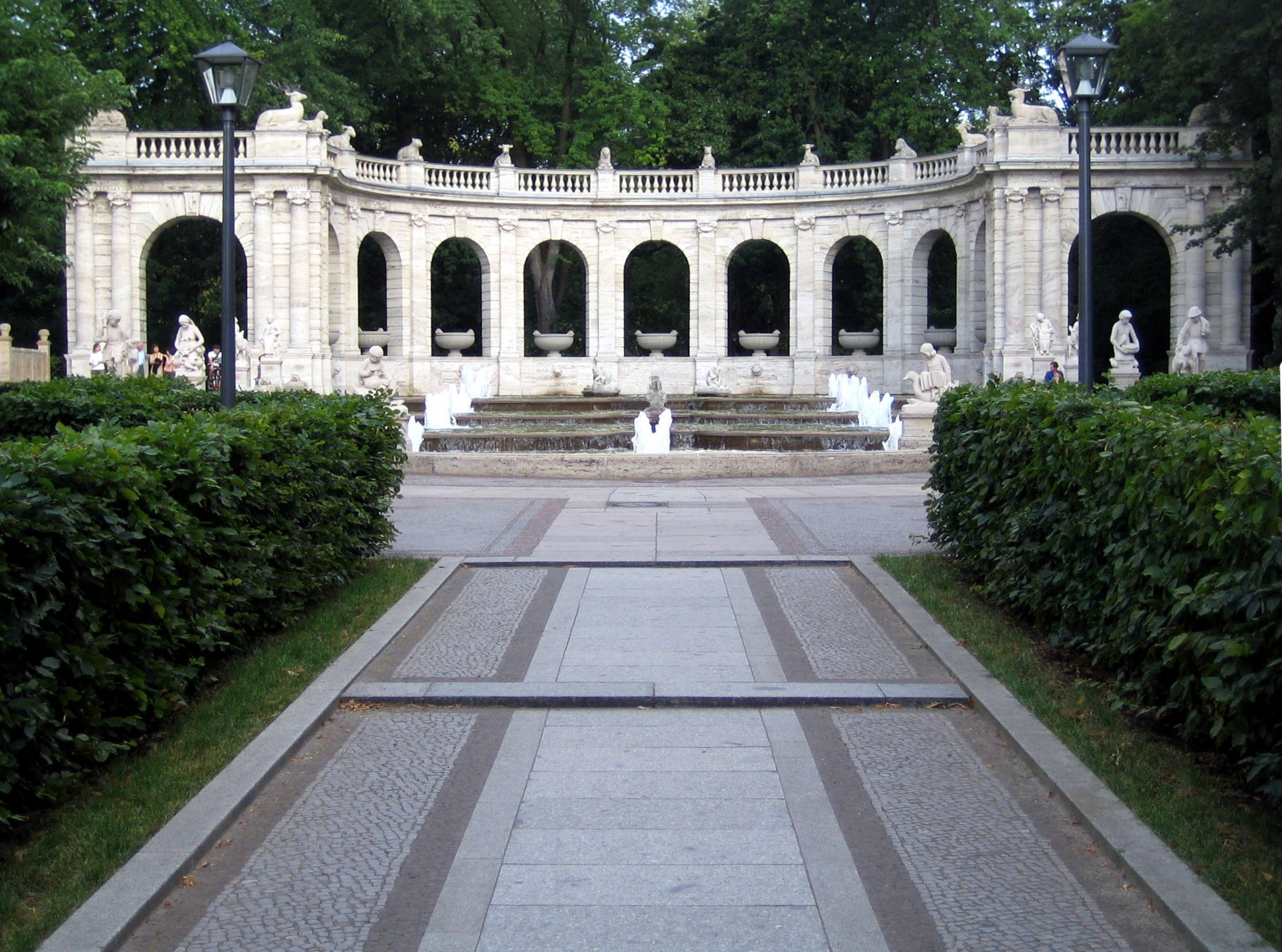 Märchenbrunnen im Berliner Volkspark Friedrichshain. Zugang mit Blick auf die Arkaden.